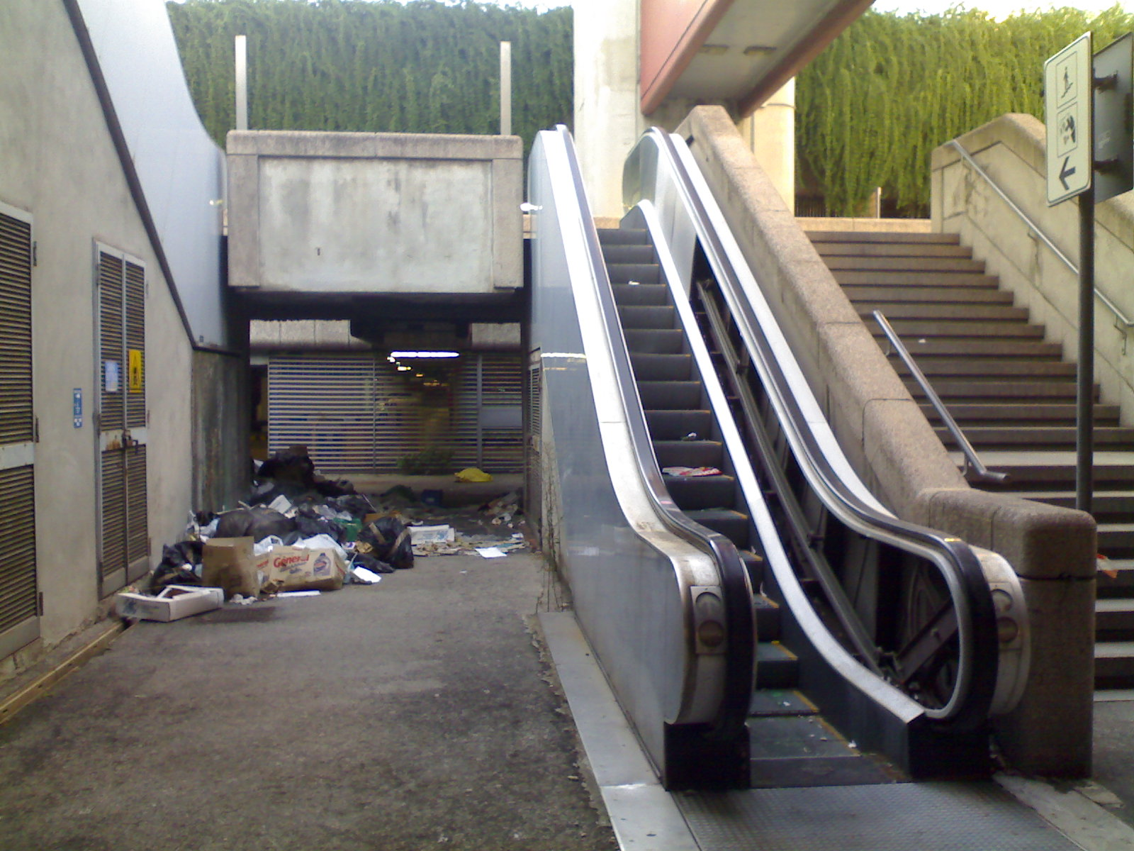 Centro Direzionale di Napoli (sotterranei)